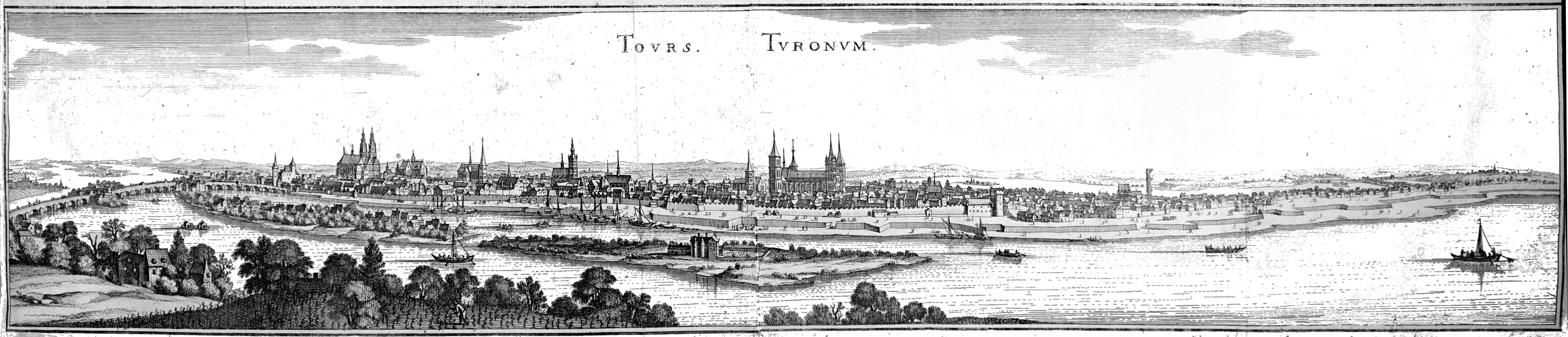 dessin de TOpographiae Galliae.